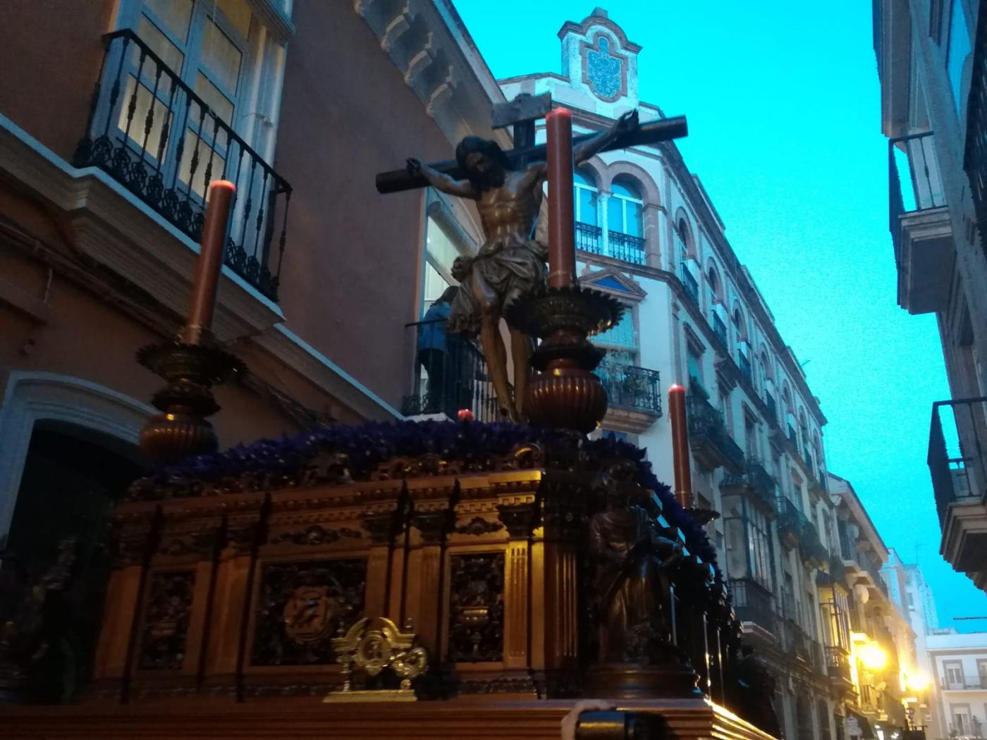 Cristo de la Misericordia (Hdad. de la Misericordia), huelva.